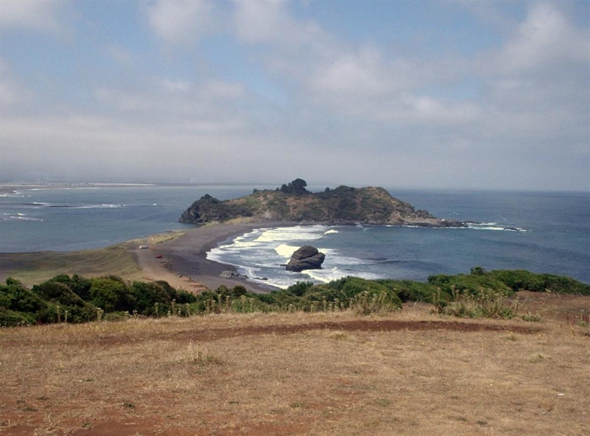 Desembocadura río Bio Bio